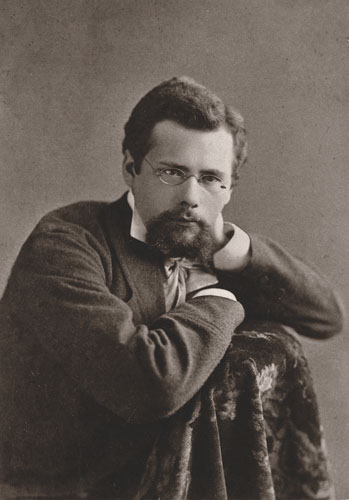 Бахрушин Владимир Александрович